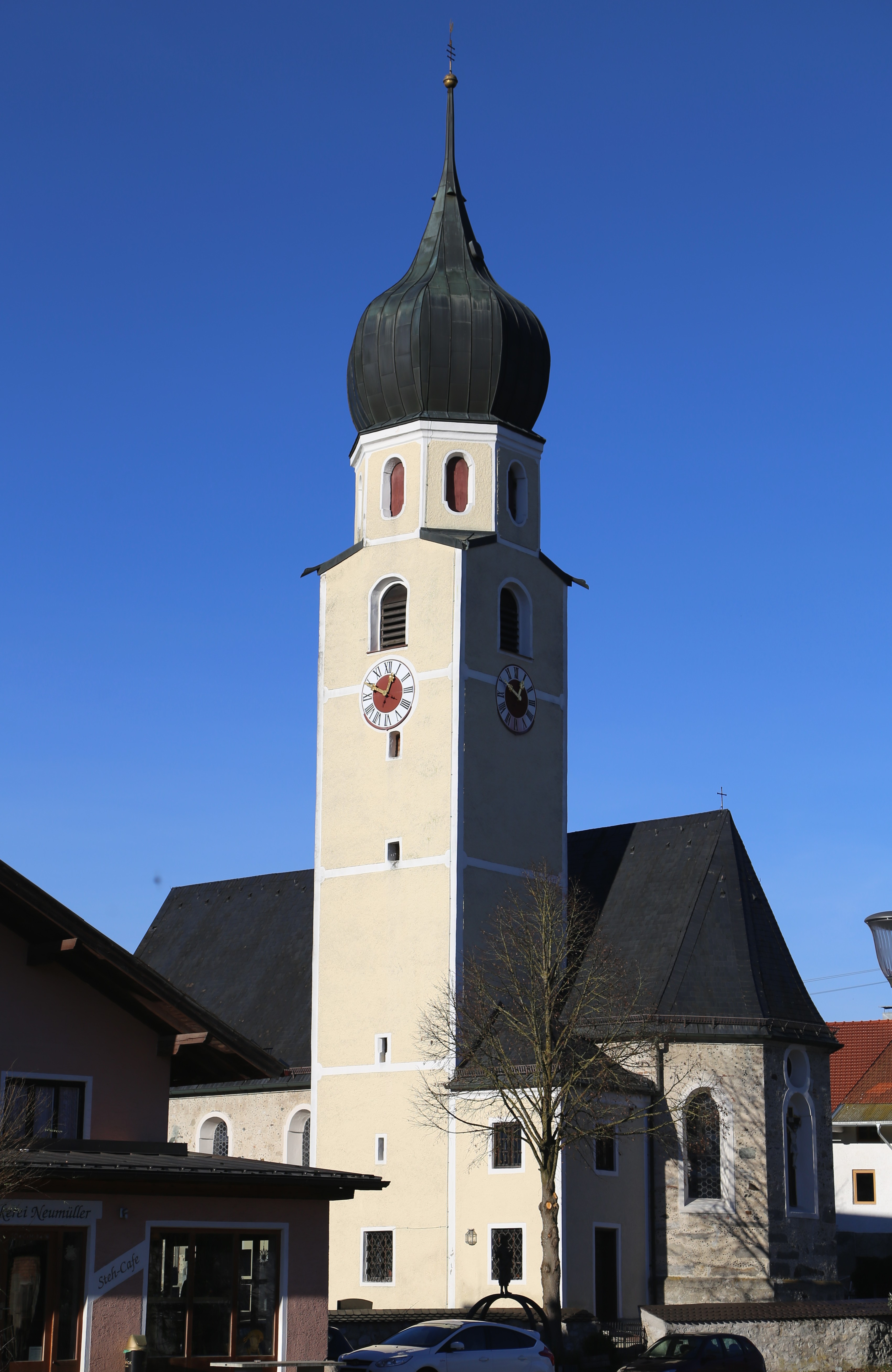 Lauterbach, Chiemseestraße 18; Kath. Filialkirche St. Johann Baptist, teils unverputzter Saalbau mit Satteldach und Nordturm mit Zwiebelhaube, erbaut wohl 1. Hälfte 15. Jh., um 1670 und 1755 barocke Umbauten, erweitert 1830 und 1848; mit Ausstattung.